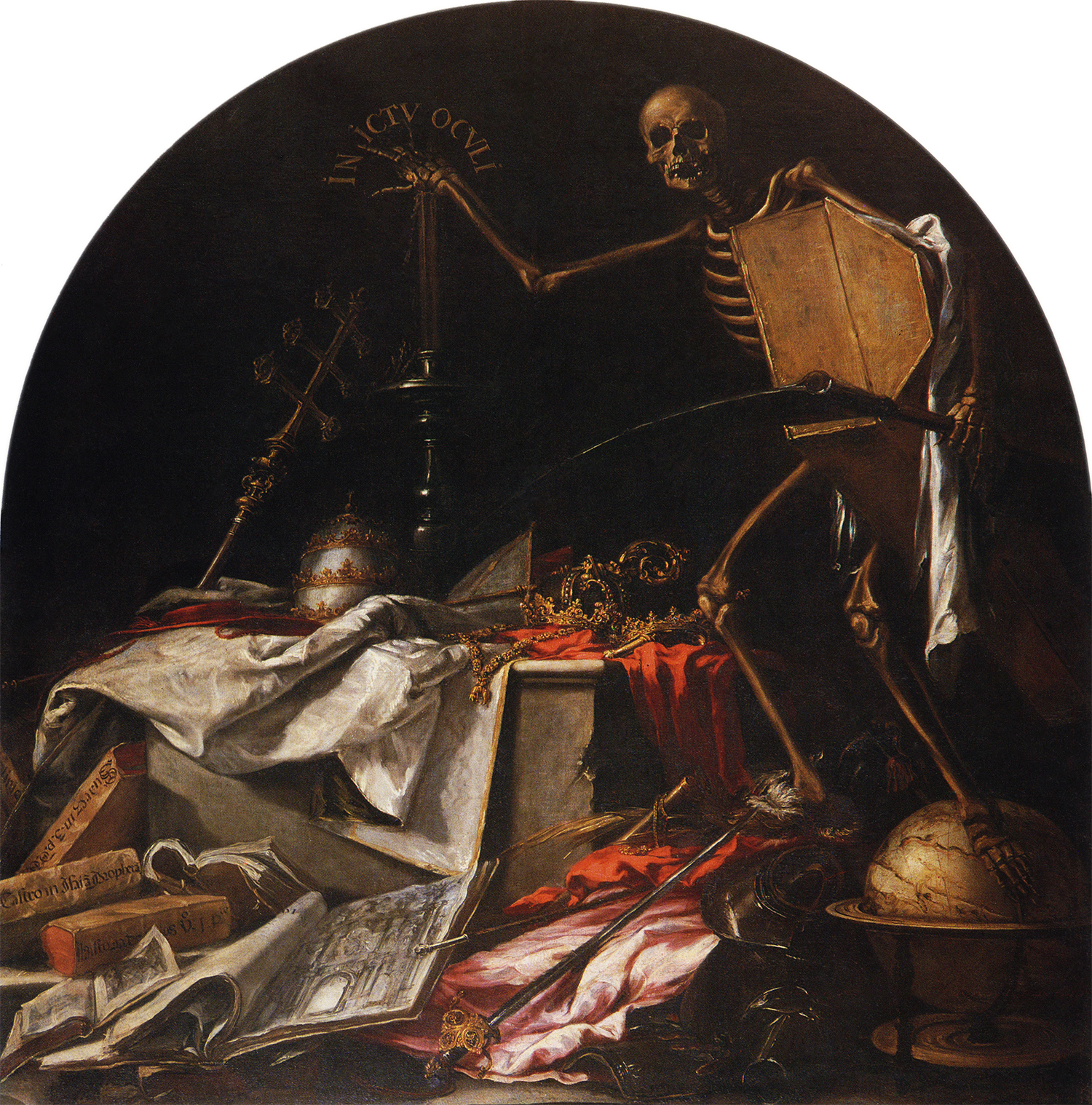 Esta obra, junto con la que lleva por título Finis Gloriae Mundi, le fue encargada a Juan de Valdés Leal para ser colocada en el sotocoro del Hospital de la Caridad de Sevilla, y al igual que en las pinturas del género Vanitas, aluden a la banalidad de la vida terrena y a la universalidad de la muerte, aunque también quedan unidas con el fin primordial de la Hermandad de la Caridad de Sevilla, que era el de enterrar a los ajusticiados e indigentes de la ciudad, al igual que otras hermandades similares existentes en España en esa época.